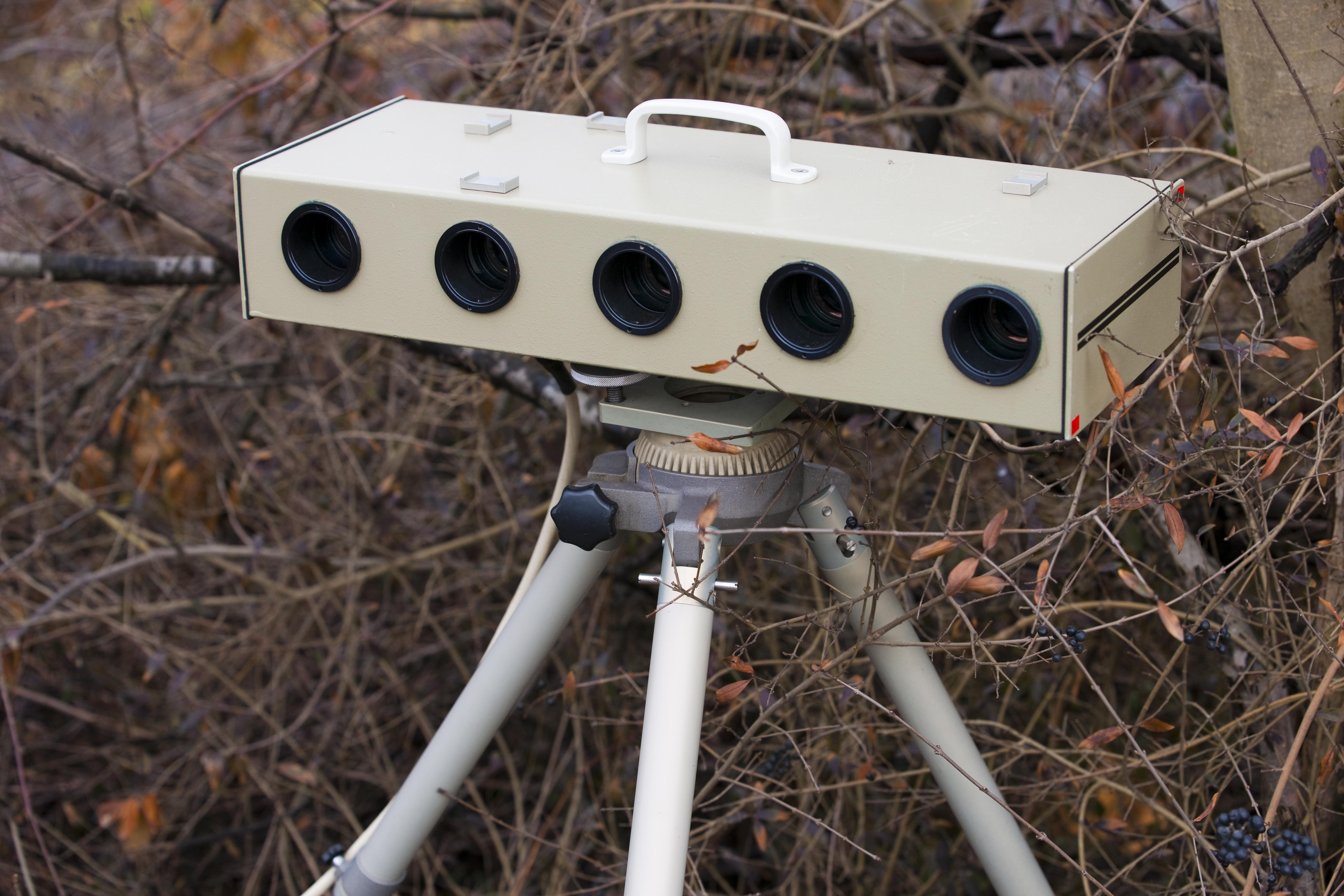 ESO Einseitensensor ES3.0